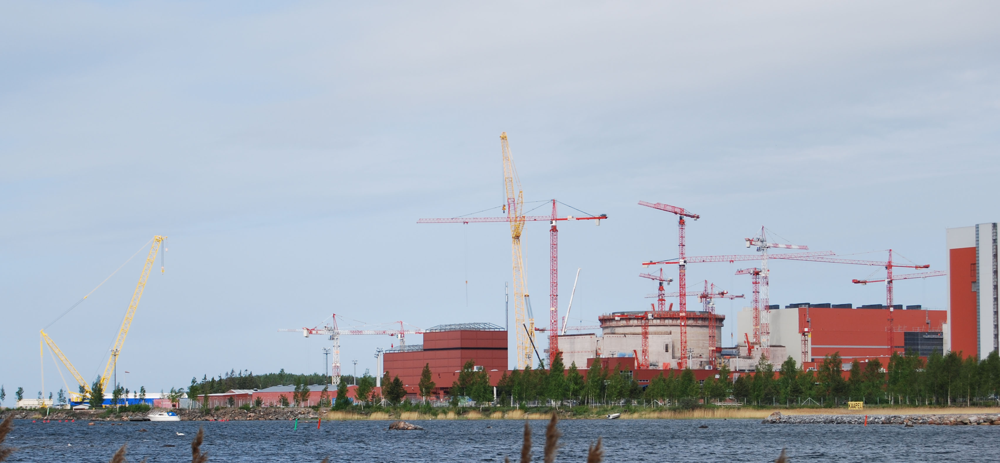 Olkiluodon kolmas voimala rakenteilla vuonna 2009.